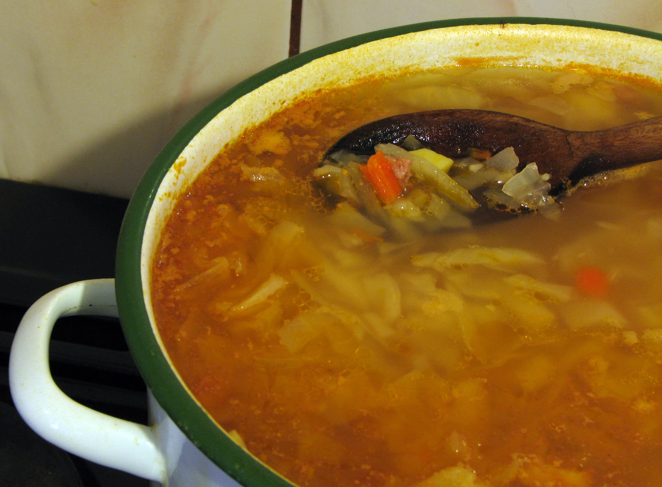 kapuśniak